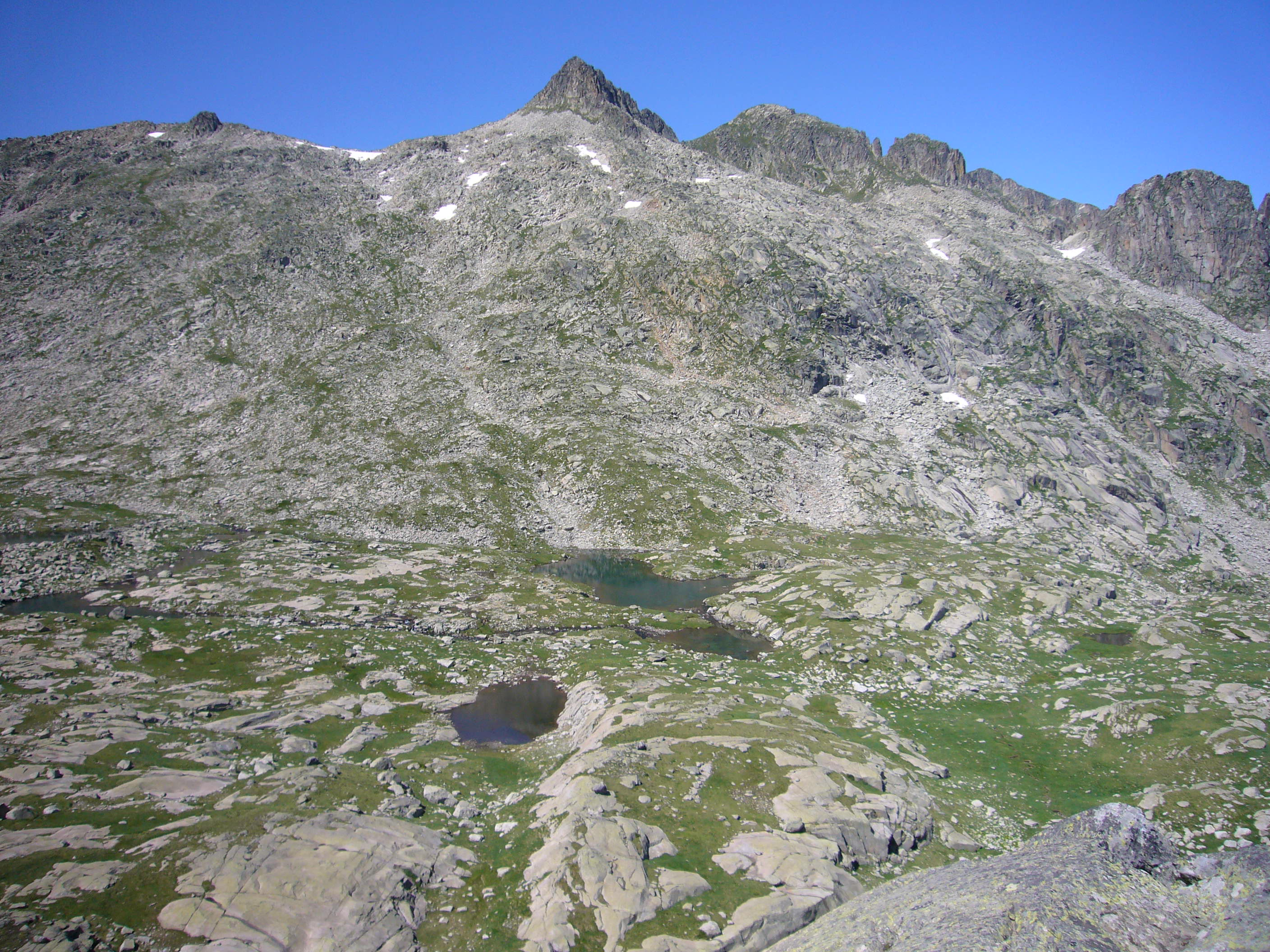 Estanhets deth Pòrt, Tuc de Serreta, Tuc de Balaguera, Agulha de Lara i Agulhes de Colomèrs, vistos des del Circ de Colomèrs; Naut Aran, Vall d’Aran, Catalunya